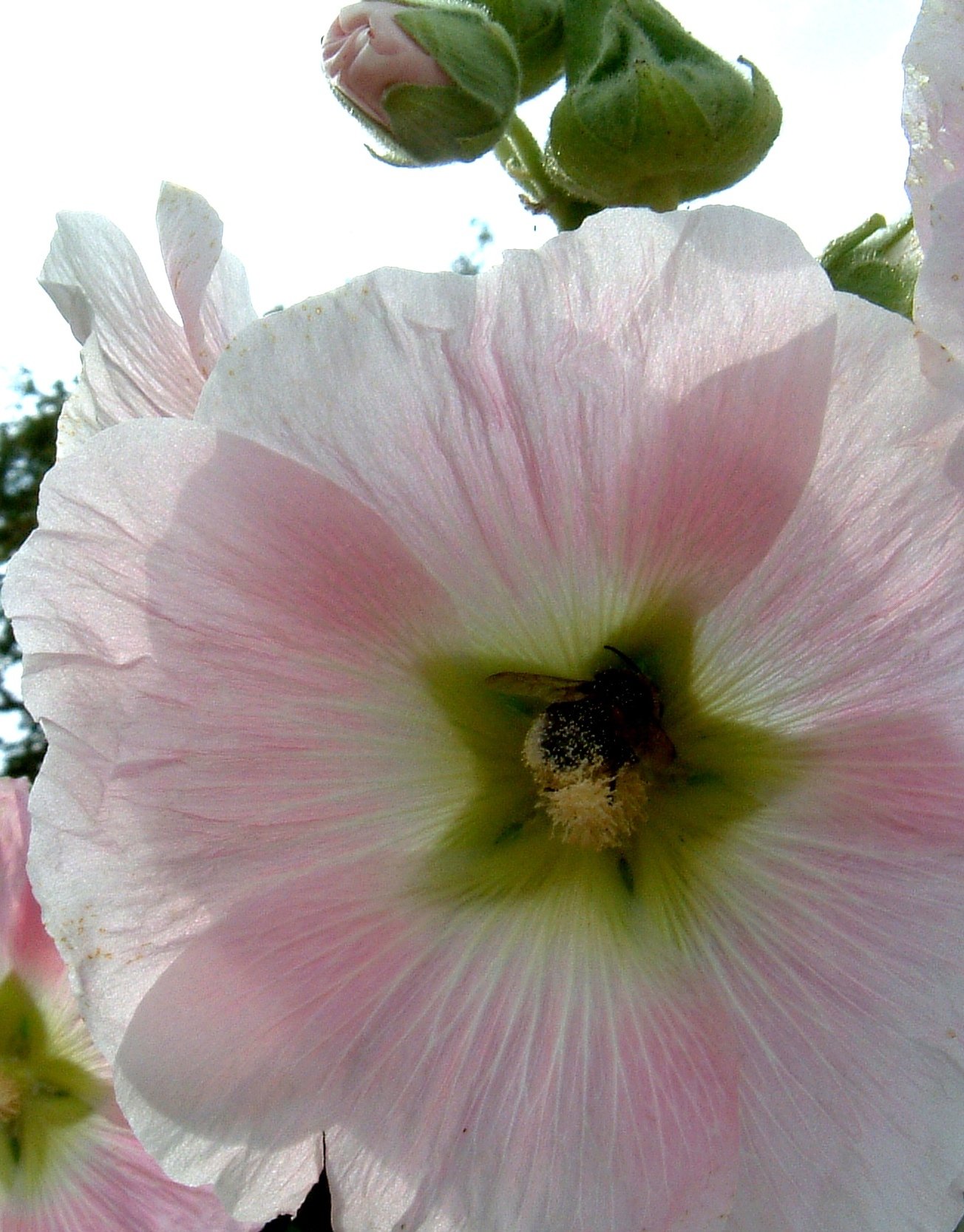 Stockrose_(Alcea_rosea)